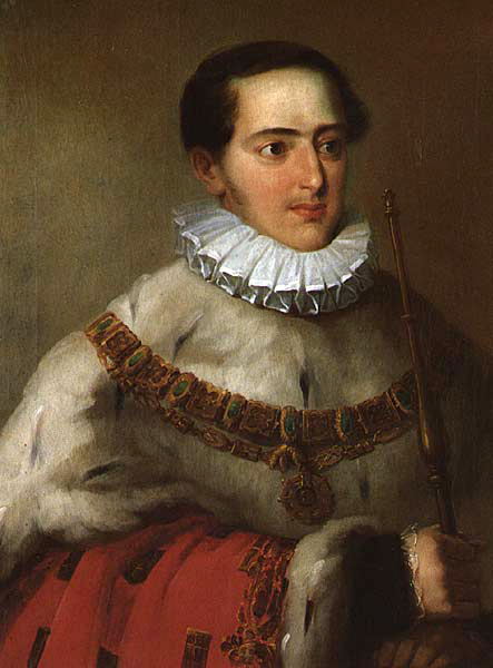 Summary Rei de Portugal Licensing 22:21, 12 Março 2006 L Gonçalves 246x300 (21913 bytes) (Rei de Portugal)